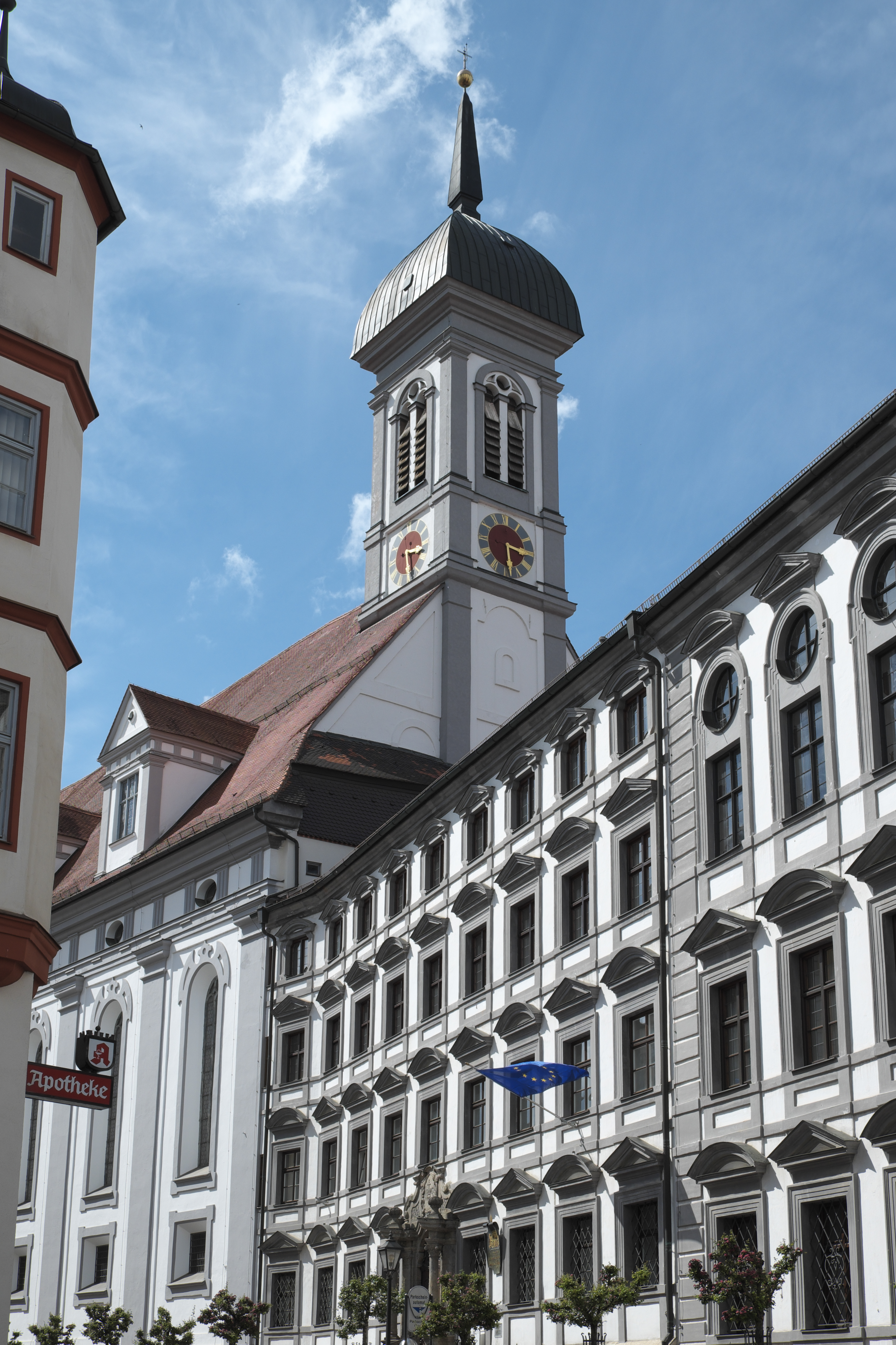 Studienkirche Mariä Himmelfahrt in Dillingen an der Donau (Bayern)